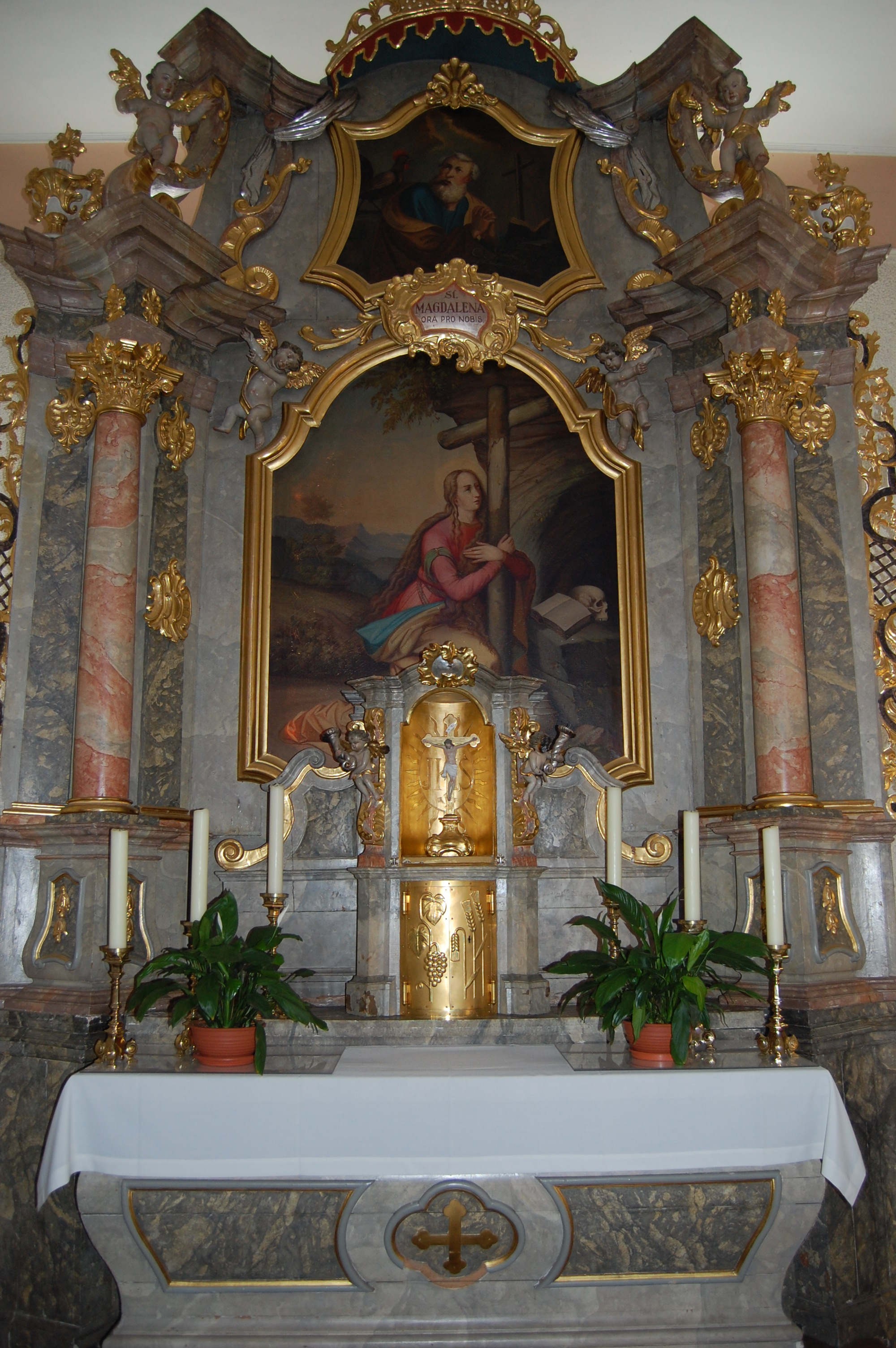 Altar in der Expositurkirche Maria Magdalena in Gleiritsch